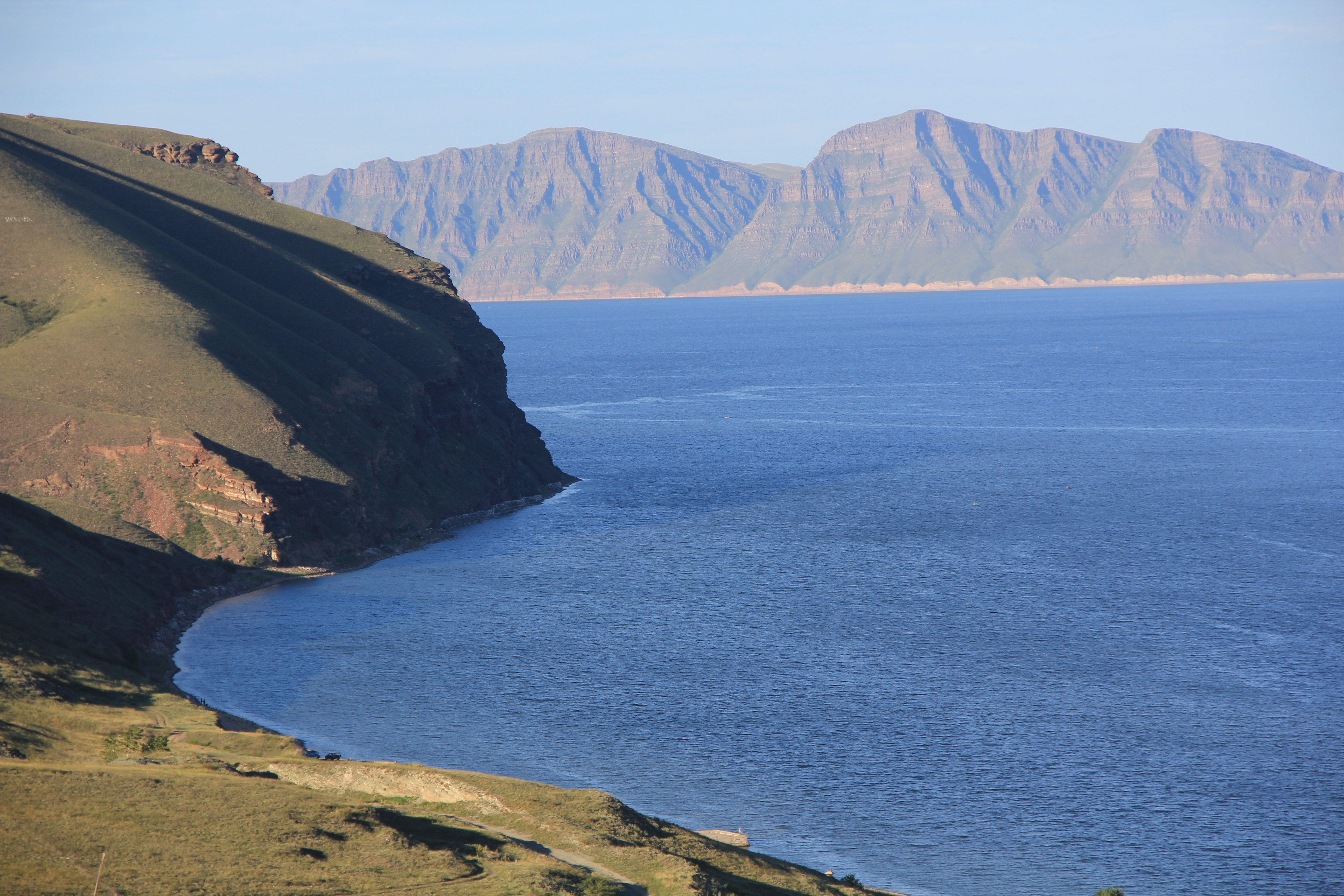 Гора Куня, Усть-Абаканский район This image is related to the protected area of Russia number 1910081